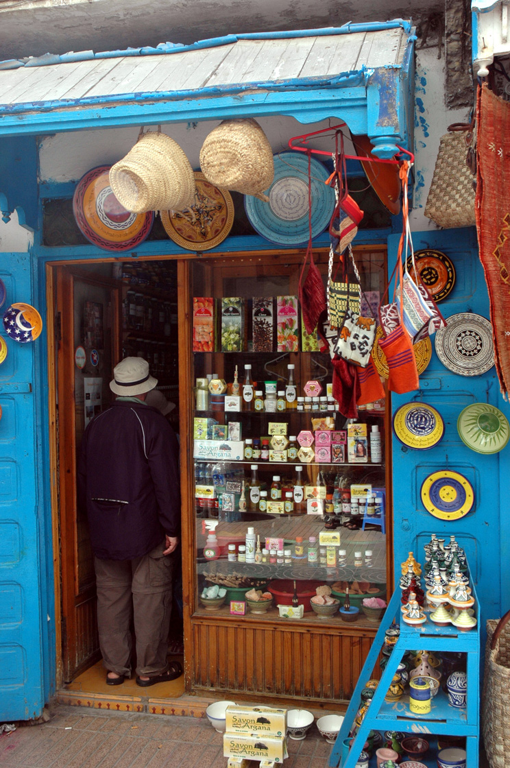 Une échoppe